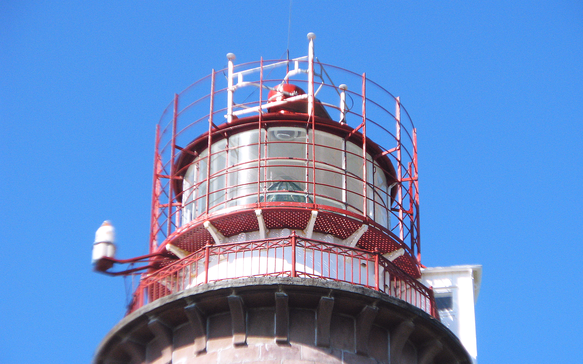 Lista Fyr Leuchtturm 1836 Laterne Höhe 39 Lichtstärke 1026 kcd Reichweite 17 sm 32 km westlich Farsund lufthavn Vest-Agder Norwegen Foto Wolfgang Pehlemann IMG_1235